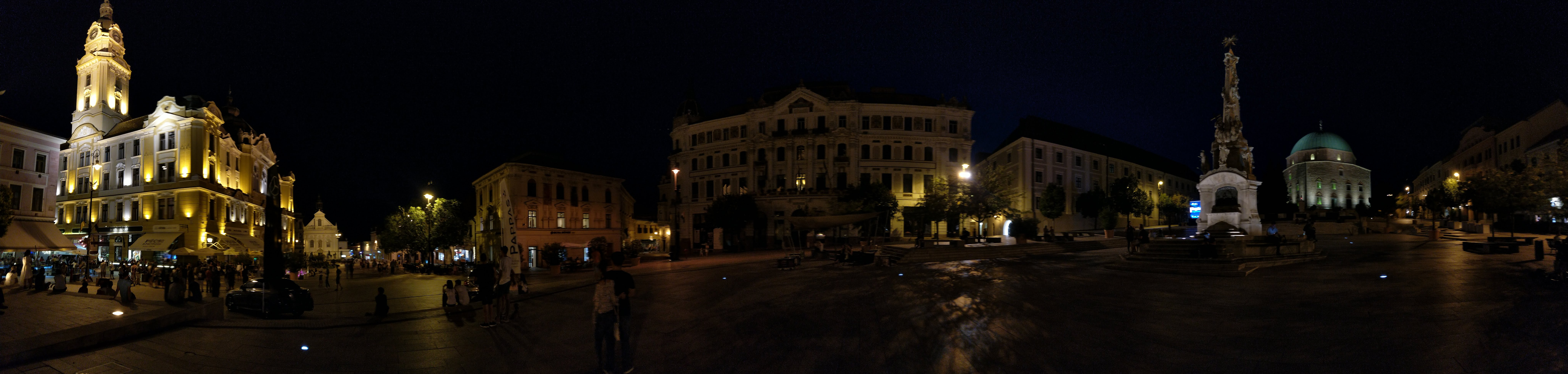 Panorama des abendlichen Széchenyi tér (Hauptplatz) mit sich auf das Rathaus sowie die Gazi Khassim Moschee